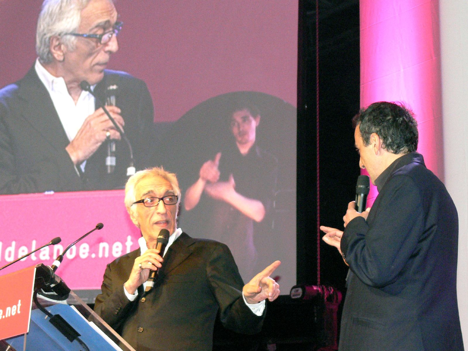 Gérard Darmon & Élie Semoun au meeting de Bertrand Delanoé, en février 2008